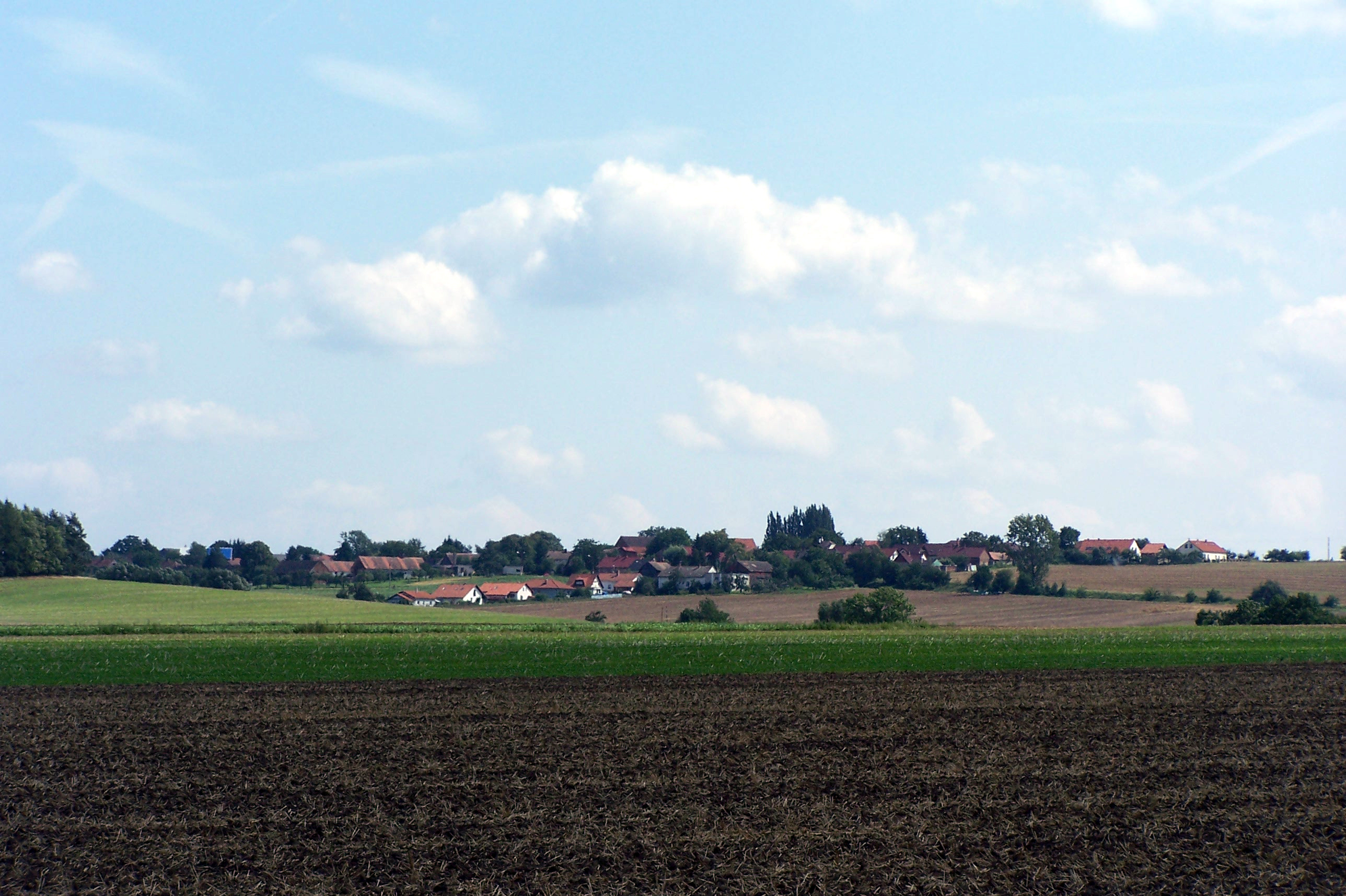 Česky: Máslojedy od silnice Benátky-Hořiněves. Loc: 50°18'47.753"N, 15°44'45.845"E